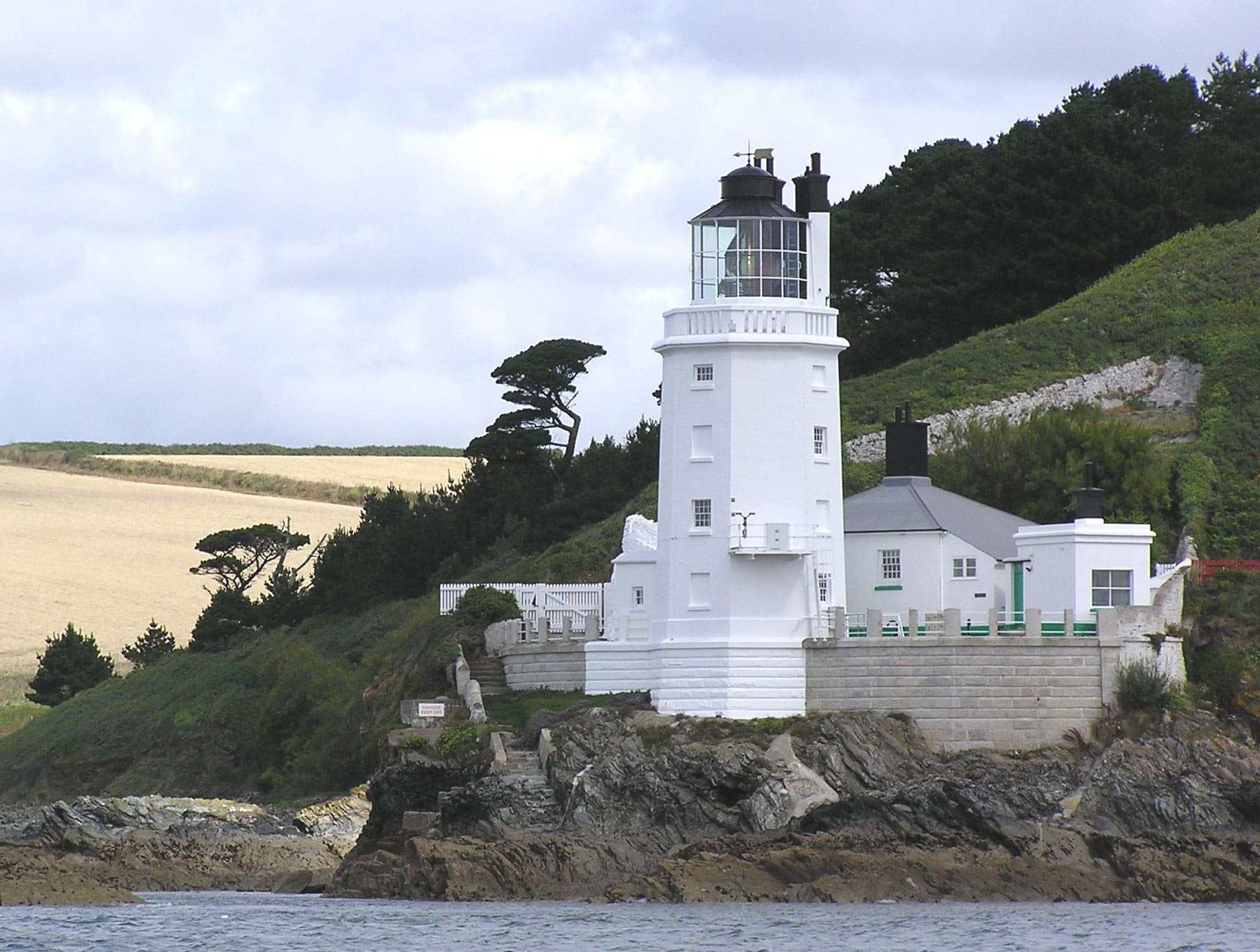 Phare de la Pointe Saint Antony à l'entrée de la rivière Fal (Falmouth) Lieu : Falmouth, Cornouaille, Royaume Uni Date : 2005 Auteur : photo personnelle